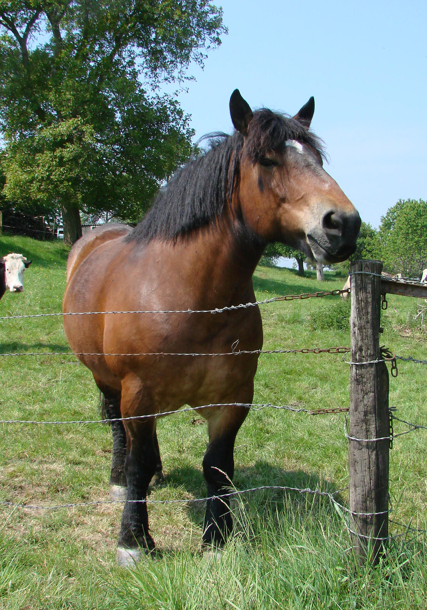 Cheval de race ardennaise